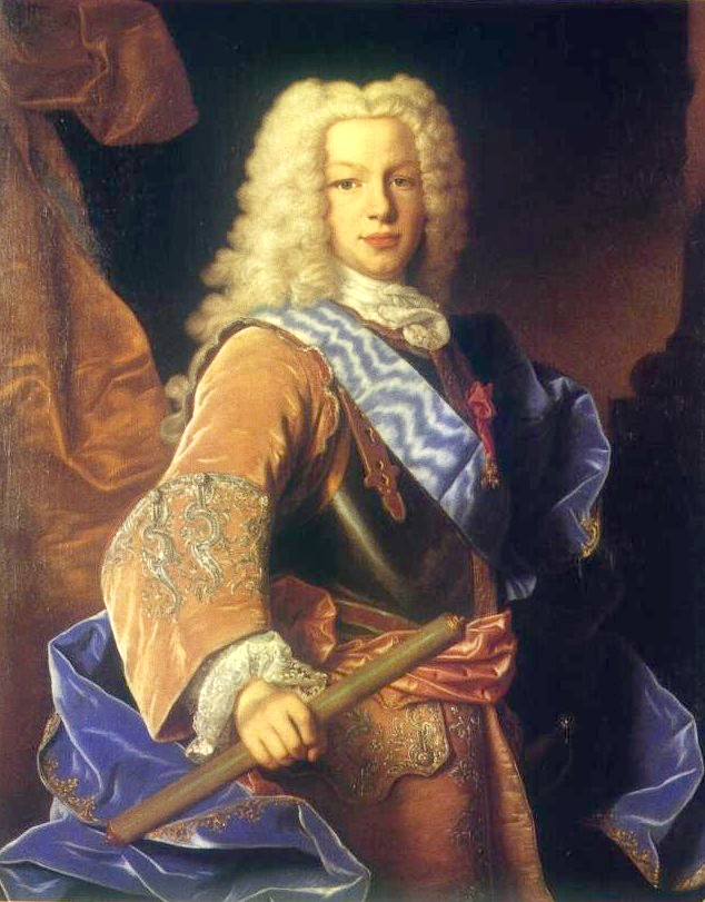 Retrato del rey Fernando VI de España (1713-1759), que fue hijo del rey Felipe V de España y de la reina María Luisa Gabriela de Saboya.